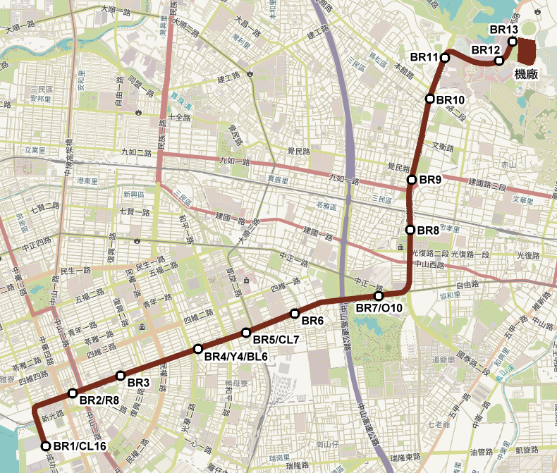 高雄捷運 輕軌棕線 在2000初的規劃